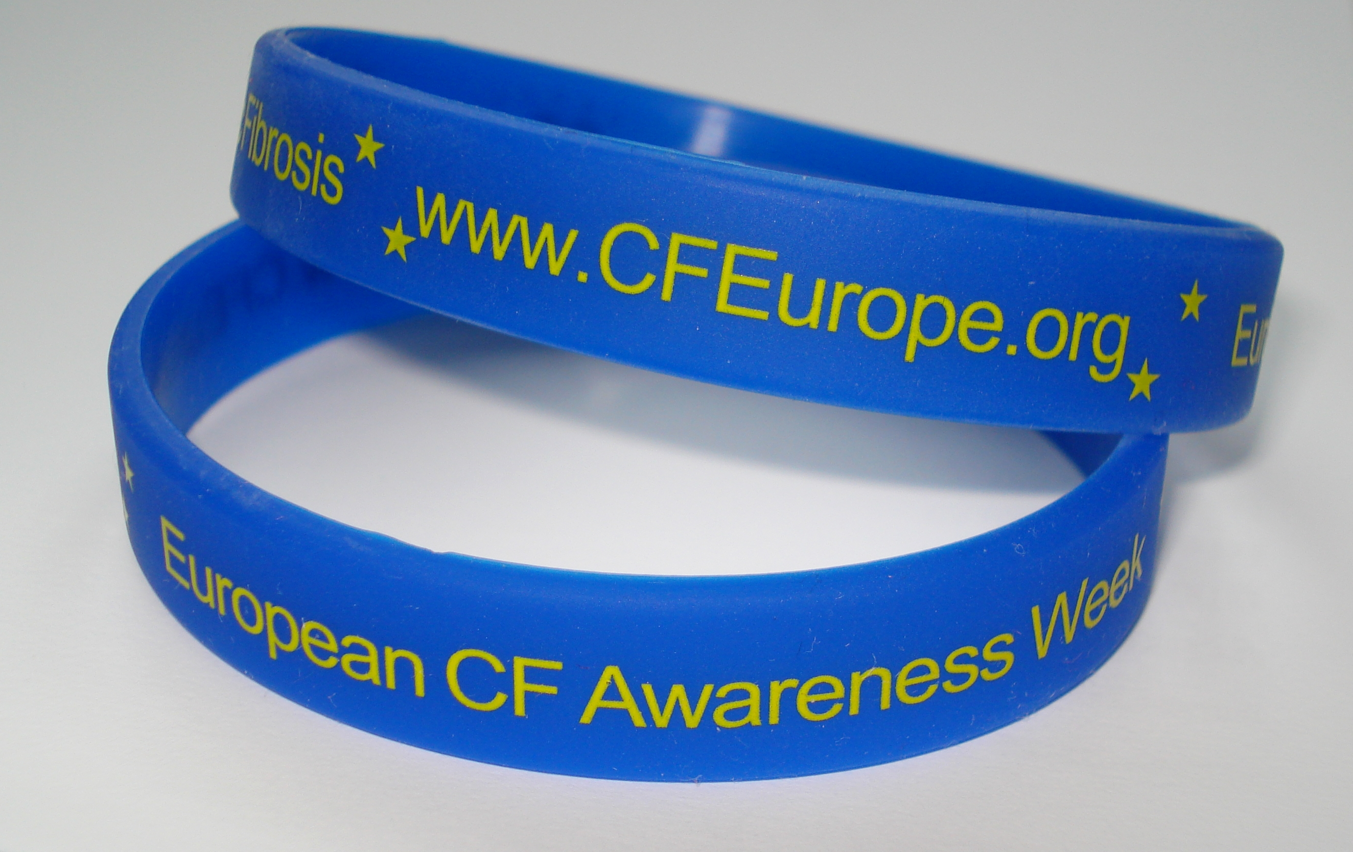 Društvo za cistično fibrozo Slovenije – 1. evropski teden o CF.